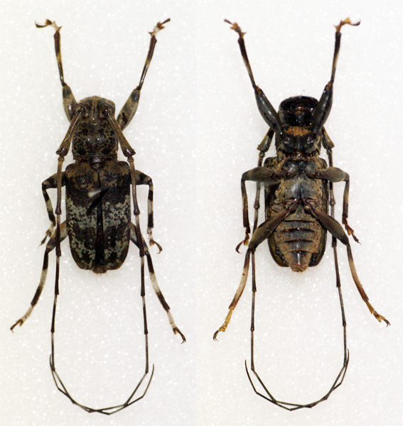 Breuning,1968 Sex: Male Data: 10-2013 - Samar - Eastern Vizcaya - Philippines Size: ?